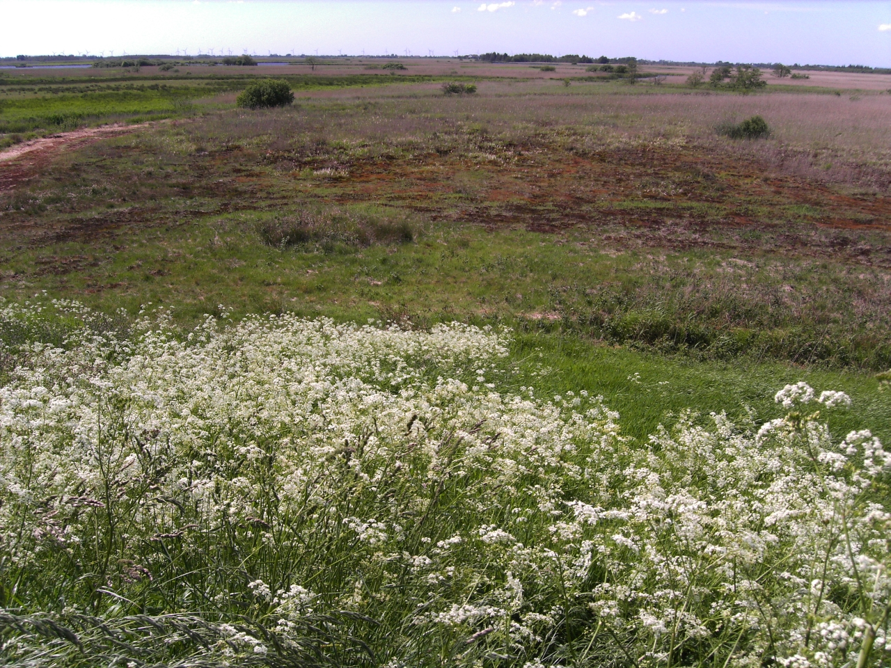 Heidelandschaft im Naturschutzgebiet Gotteskoogsee